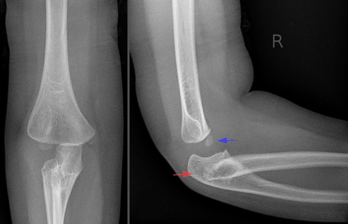 Kongenitale Radiusköpfchenluxation beidseits bei einem zweijährigen Mädchen. Röntgenbild a.p. und seitlich. Das proximale Ende des Radius zeigt nicht auf den Knochenkern des Capitulum humeri. Der Befund ist rechts ausgeprägter als links. Ausserdem fällt eine Sklerose am proximalen radioulnaren Gelenk auf, was als Hinweis auf eine Synostose zu werten ist. Klinisch Supinationsdefizit beidseits, rechts auch Streckdefizit.